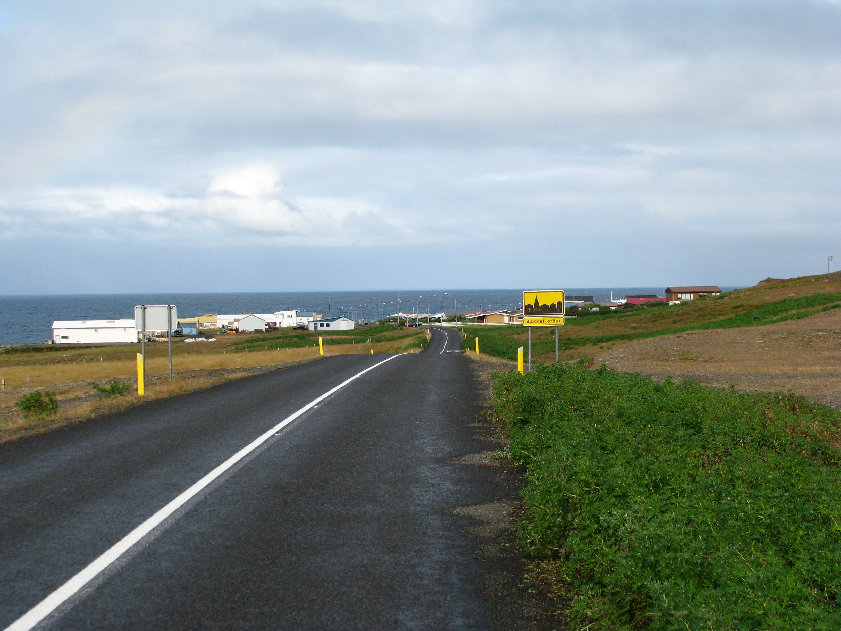 Bakkafjörður, Iceland